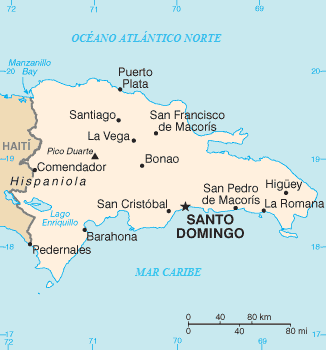 Mapa de la República Dominicana en español.